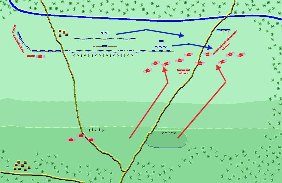 Description